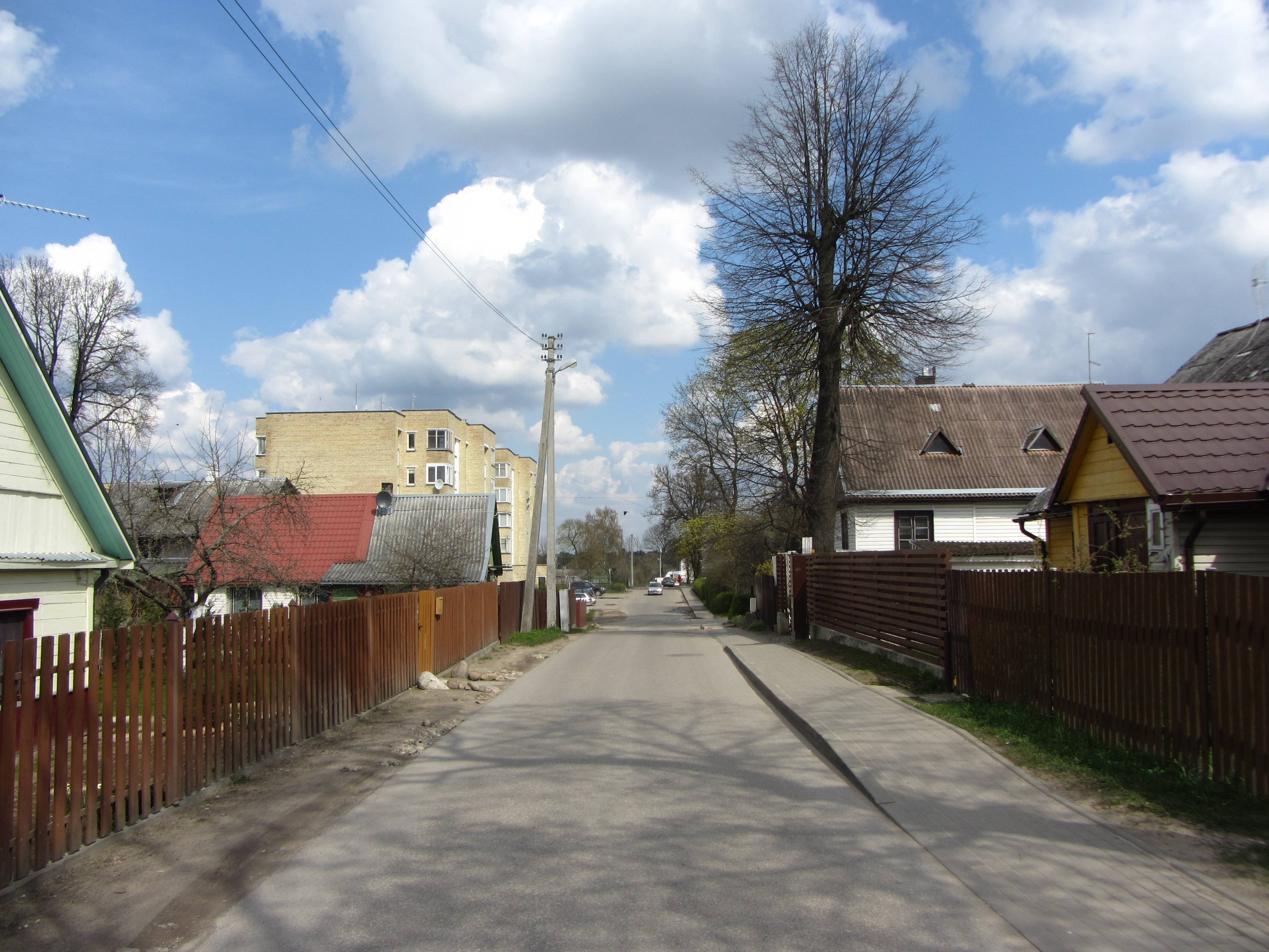 Lentvaris, Lithuania